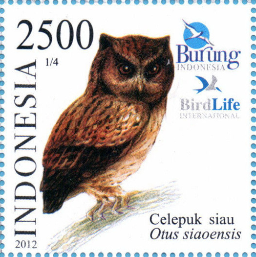 Otus siaoensis